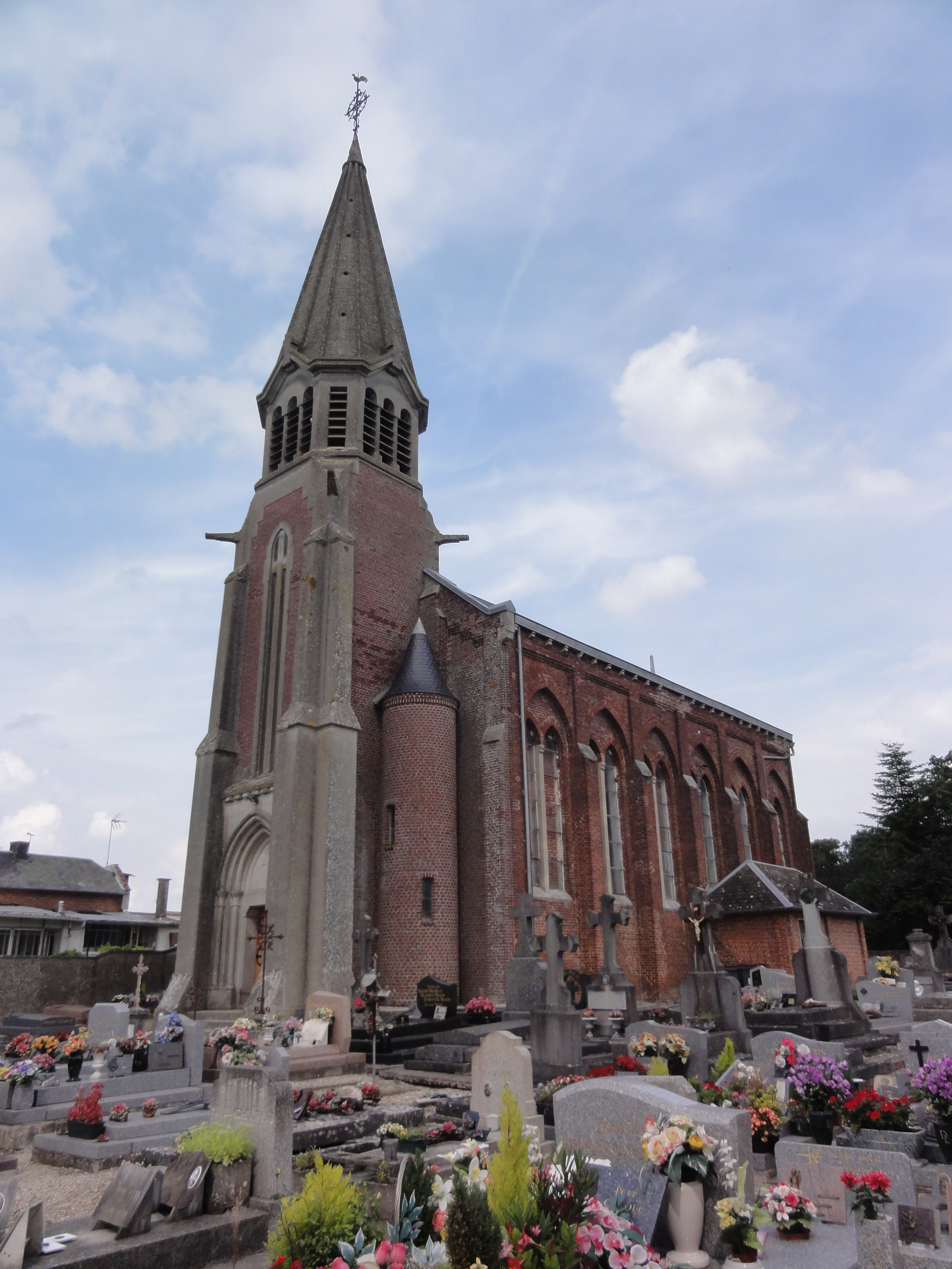 Remaucourt (Aisne) église